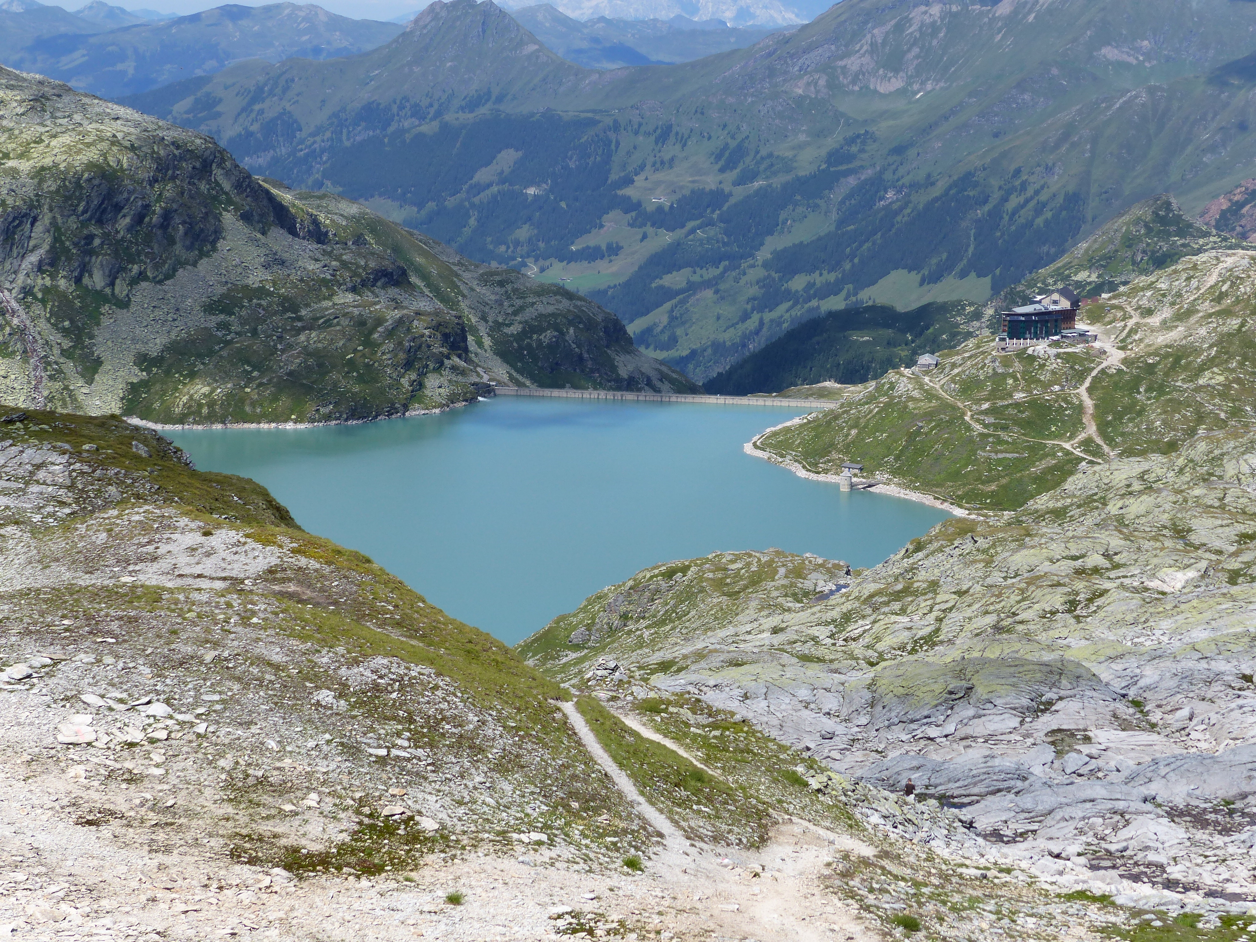 Blick vom Kalser Tauern auf den Weißsee und die Rudolfshütte